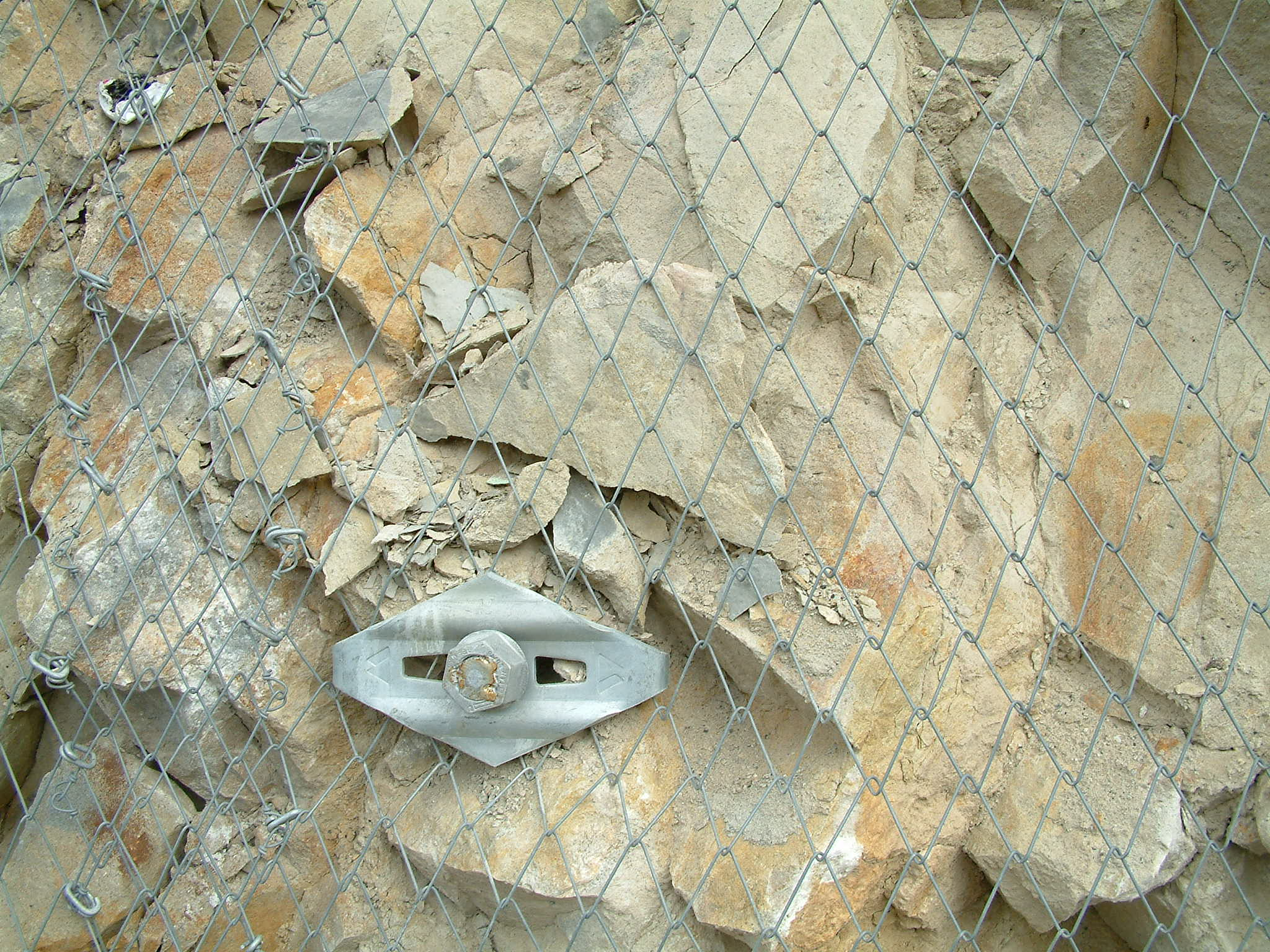 Powierzchnia skarpy skalnej pokryta siatką stalową o wysokiej wytrzymałości w połączeniu z gwoździowniem